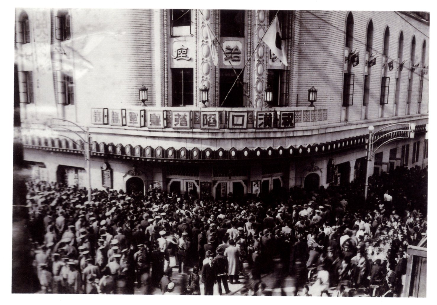 1938年（昭和13年）10月26日の漢口陥落を祝う明治座（京城府）